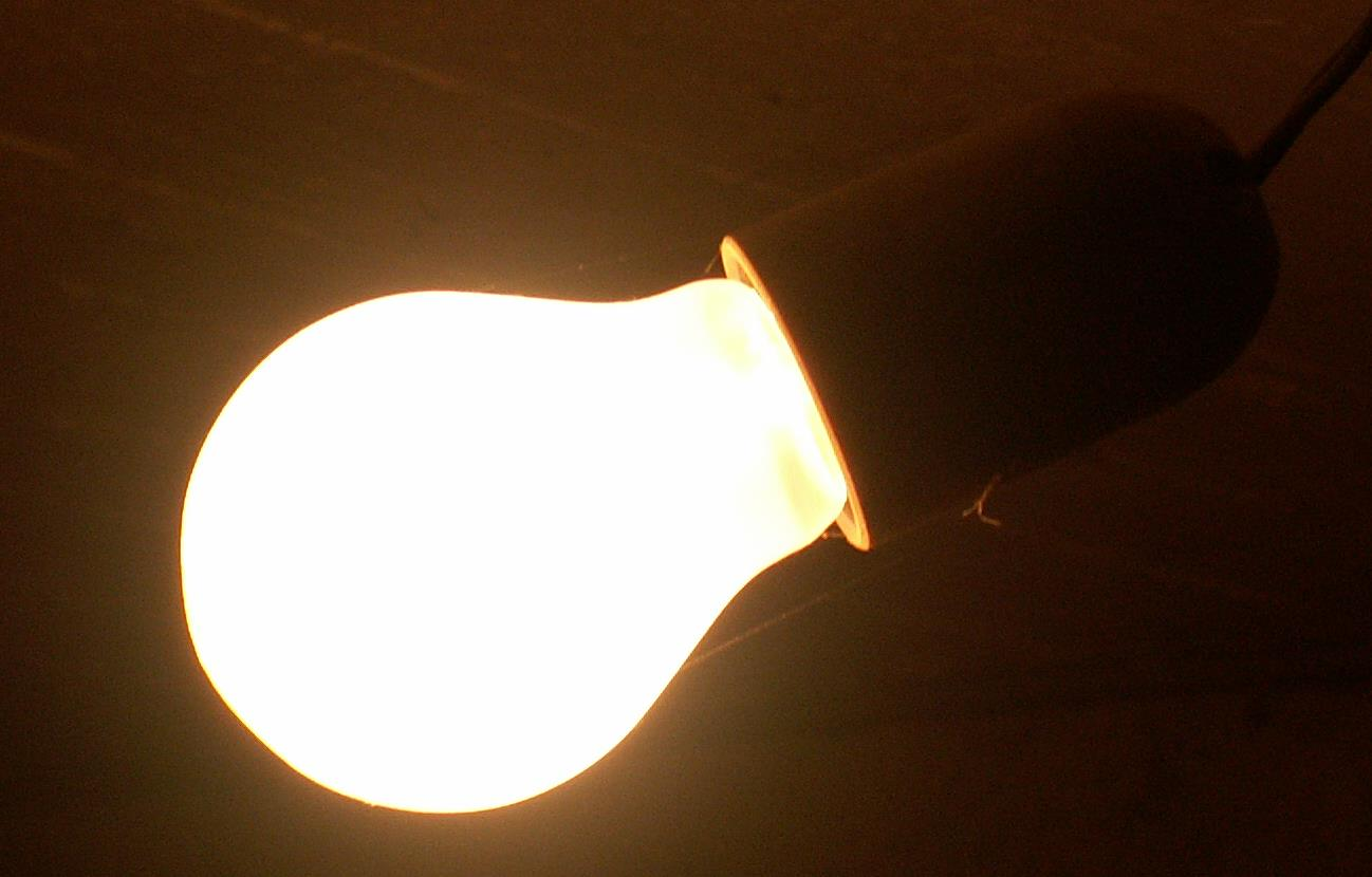 Foto einer Glühblampe (eingeschaltet)